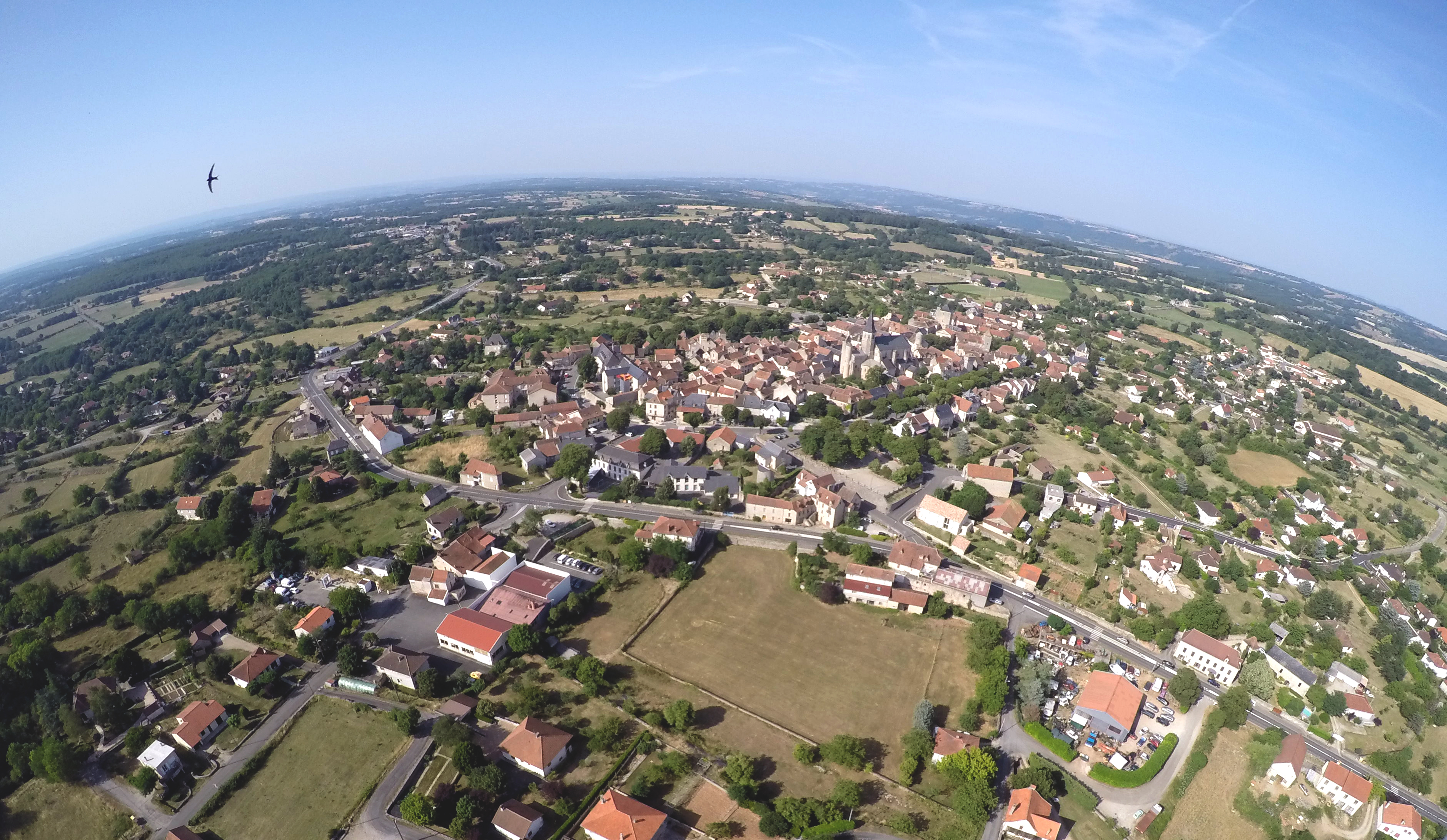 Villeneuve d'Aveyron et ses environs